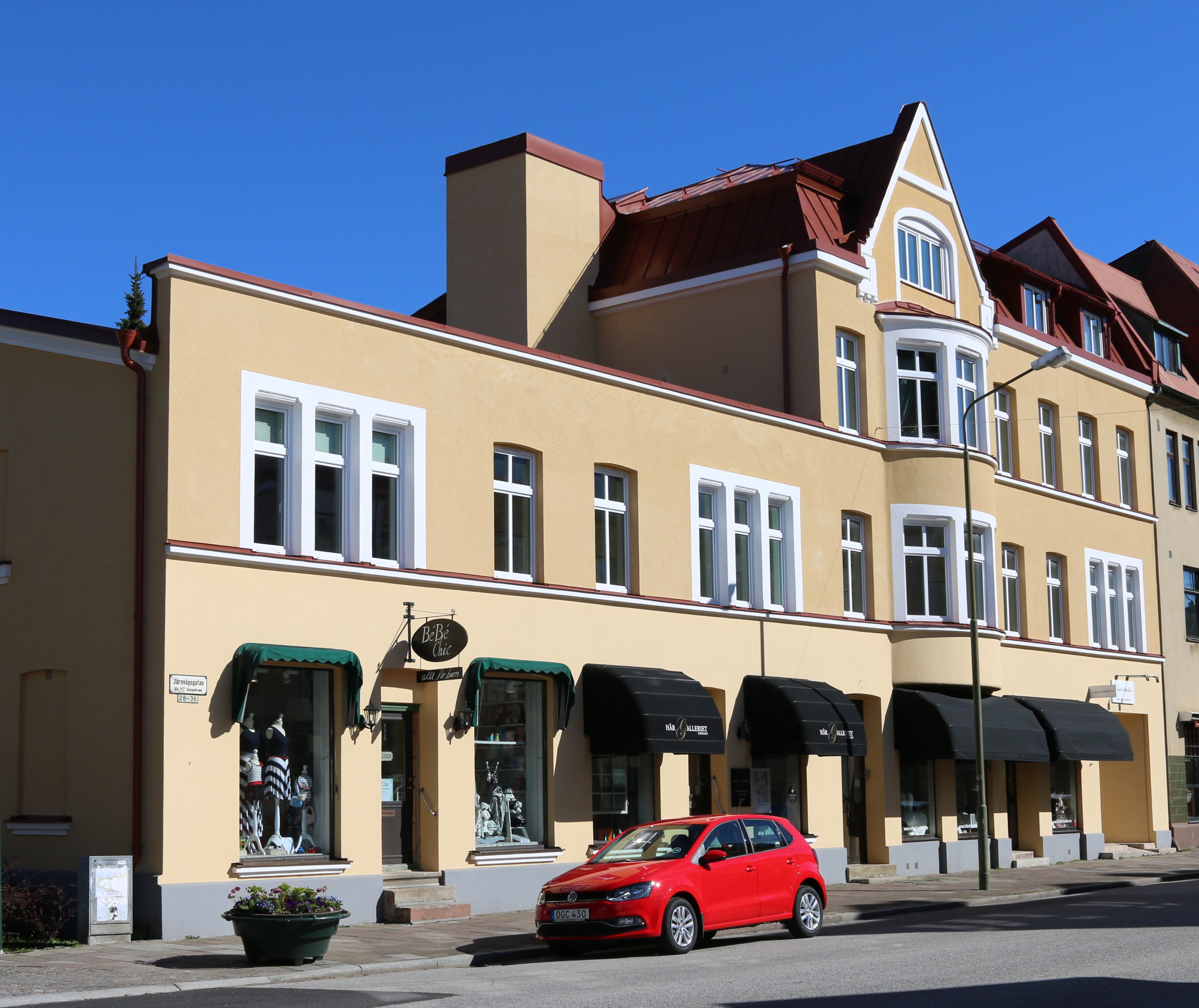 Limhamn, Huset där boicentrum tidigare fanns